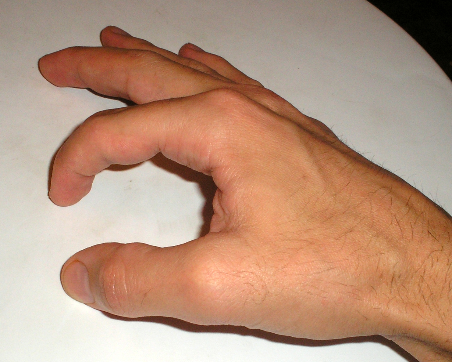 Image d'une arthrodèse d'un index d'une main droite